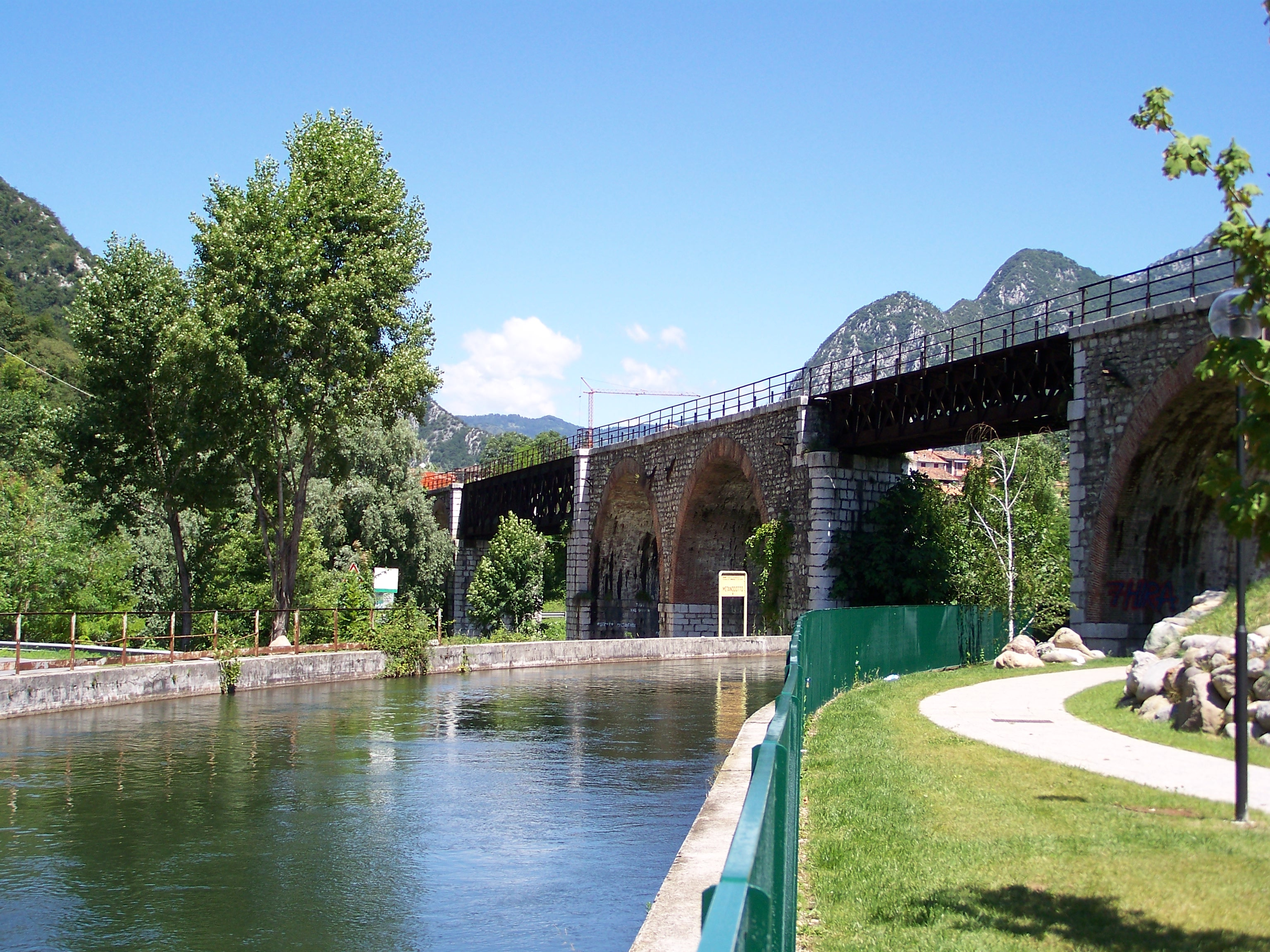 Il ponte ferroviario della Ferrovia Rezzato-Vobarno che scavalca la roggia Hefti, in primo piano e il fiume Chiese nei pressi della località Pompegnino di Vobarno.